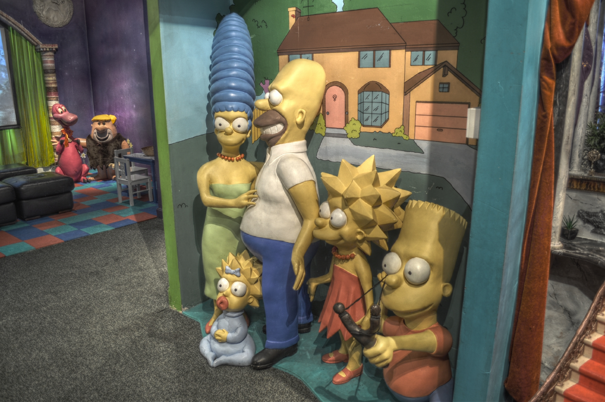 Camera: Nikon D5000 Luminance HDR, Mantiuk '06